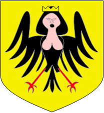 d’or à une harpie de sable, membrée de gueules et couronnée d’or, qui est de Frise orientale-Rietberg